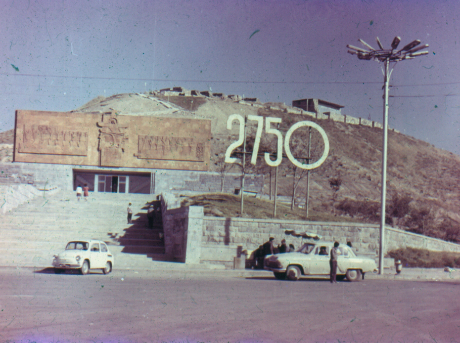 Էրեբունի թանգարան 1968